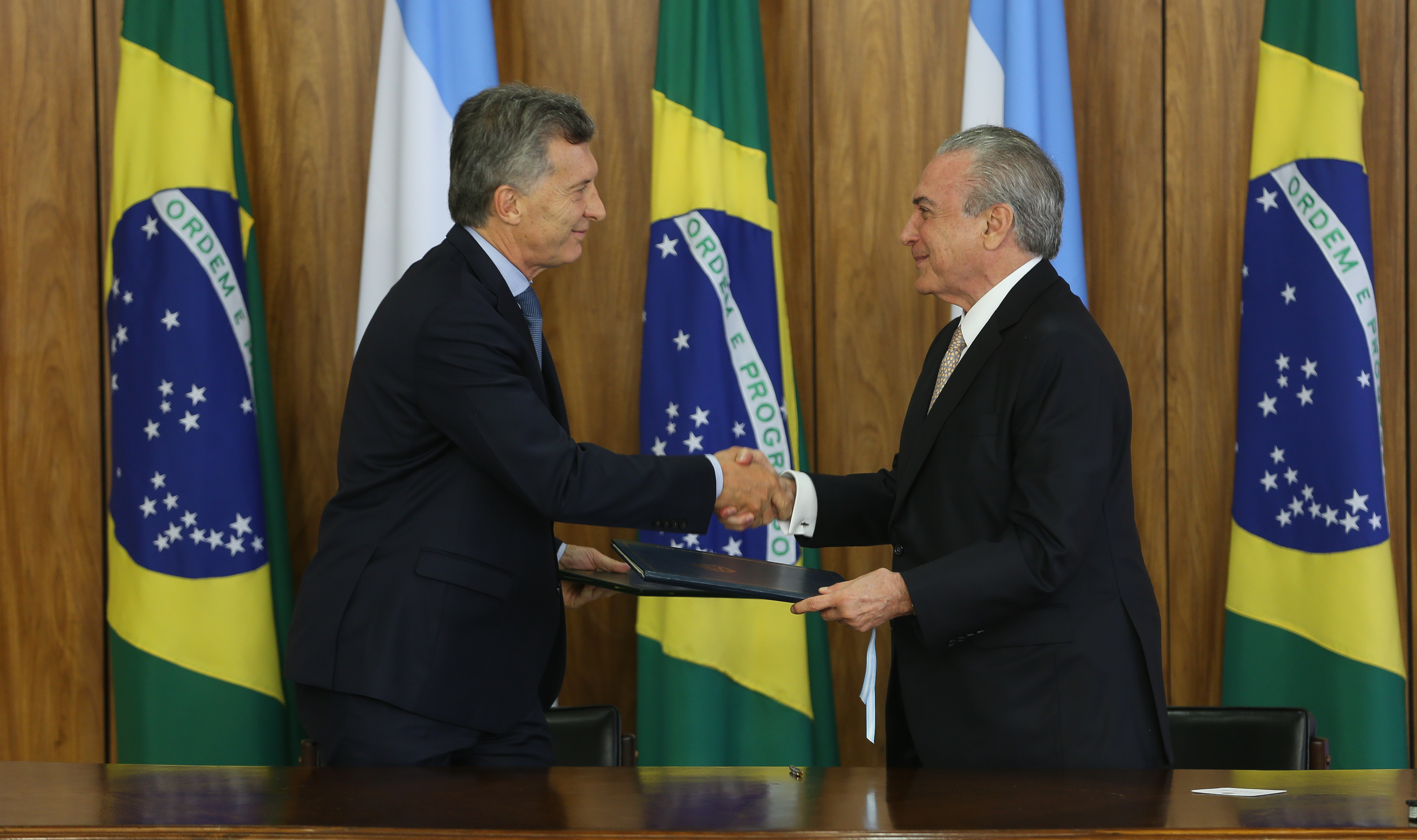 Português do Brasil: Brasília - Presidentes Maurício Macri, da Argentina, e Michel Temer durante cerimônia de assinatura de Atos, no Palácio do Planalto (Antonio Cruz/ Agência Brasil)